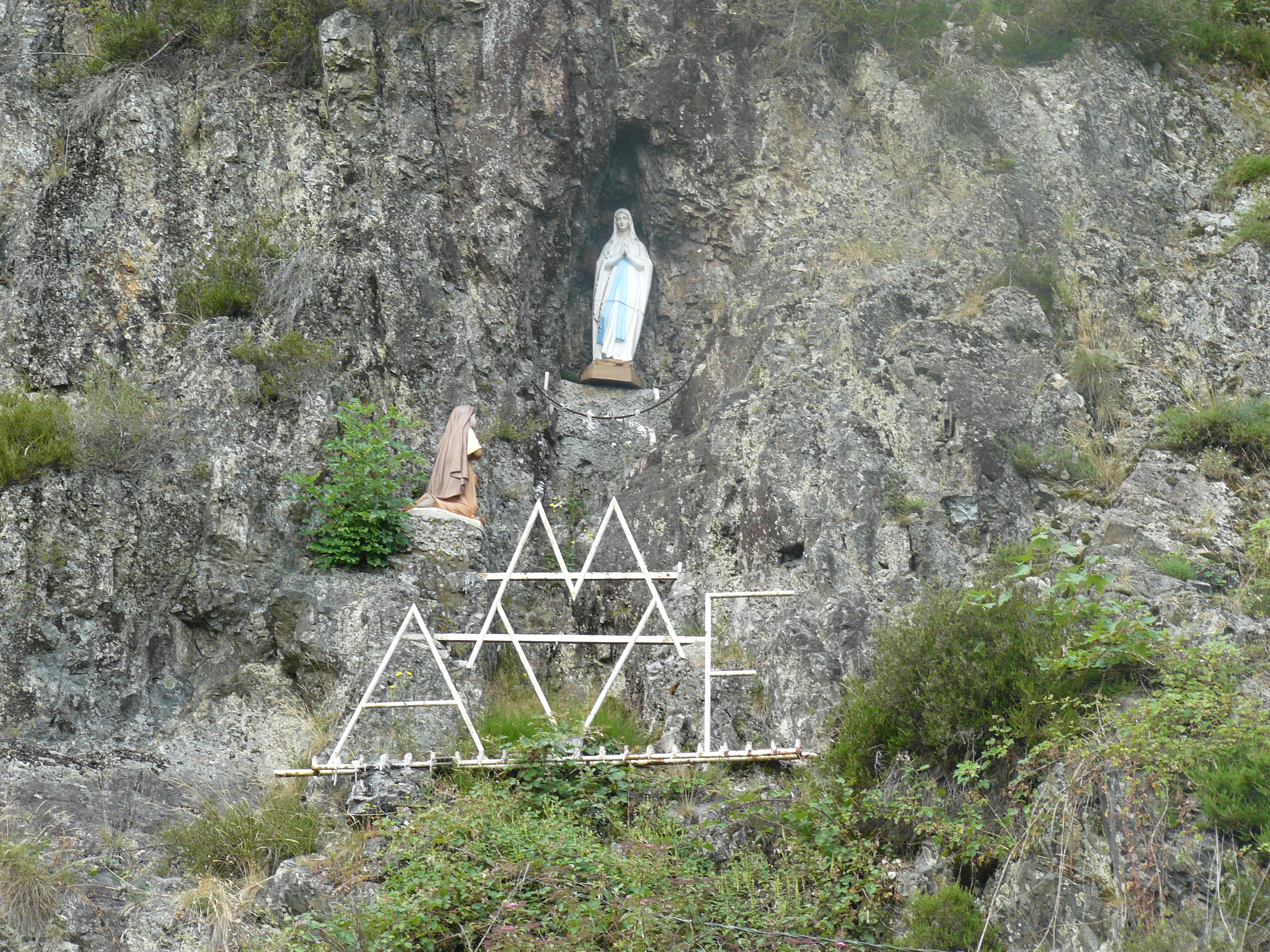 Statue de Notre Dame de Lourdes installée dans la roche